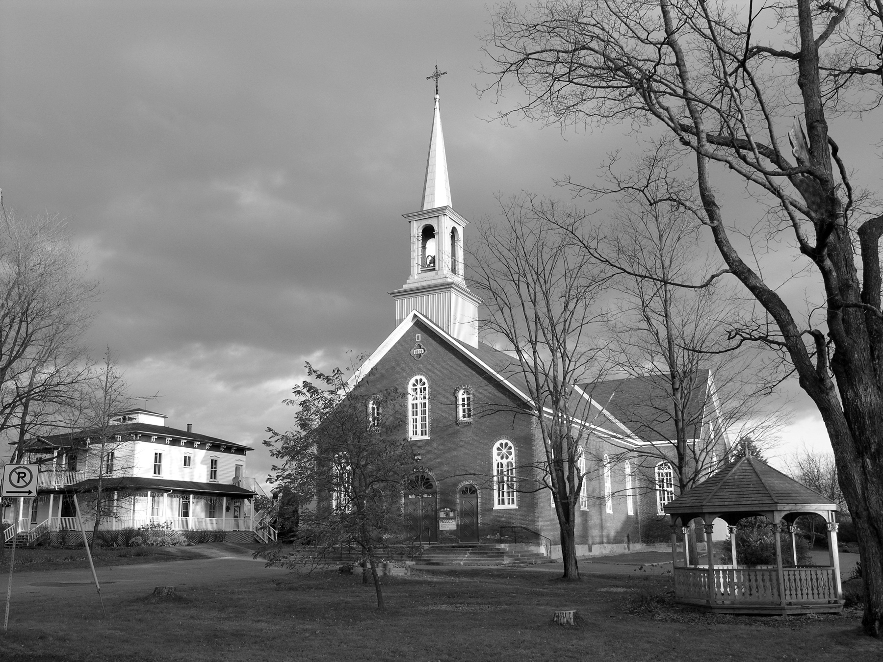 Église de Saint-Camille, 2006, photographie de Sylvain Laroche